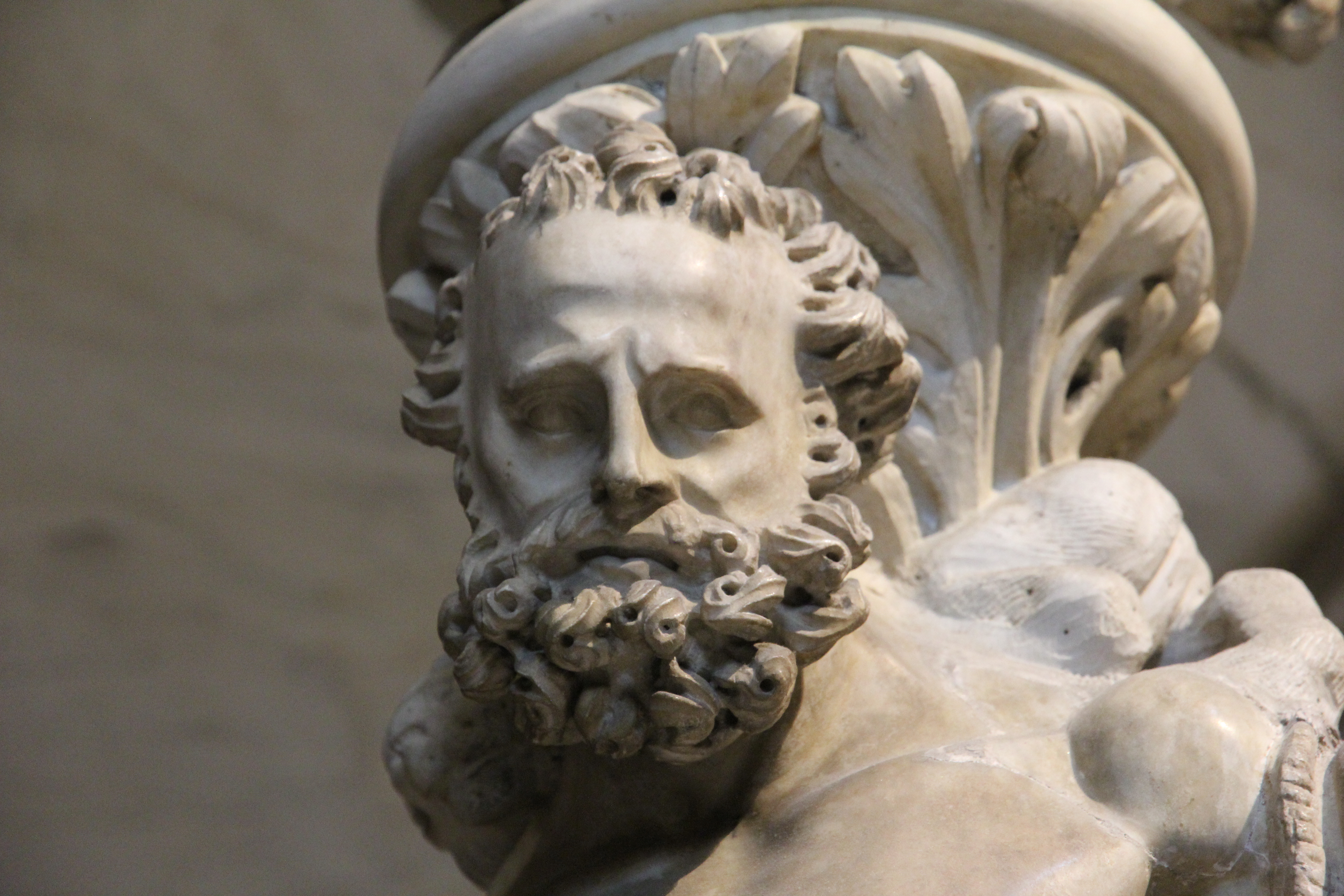 Pisa, cattedrale di Santa Maria Assunta